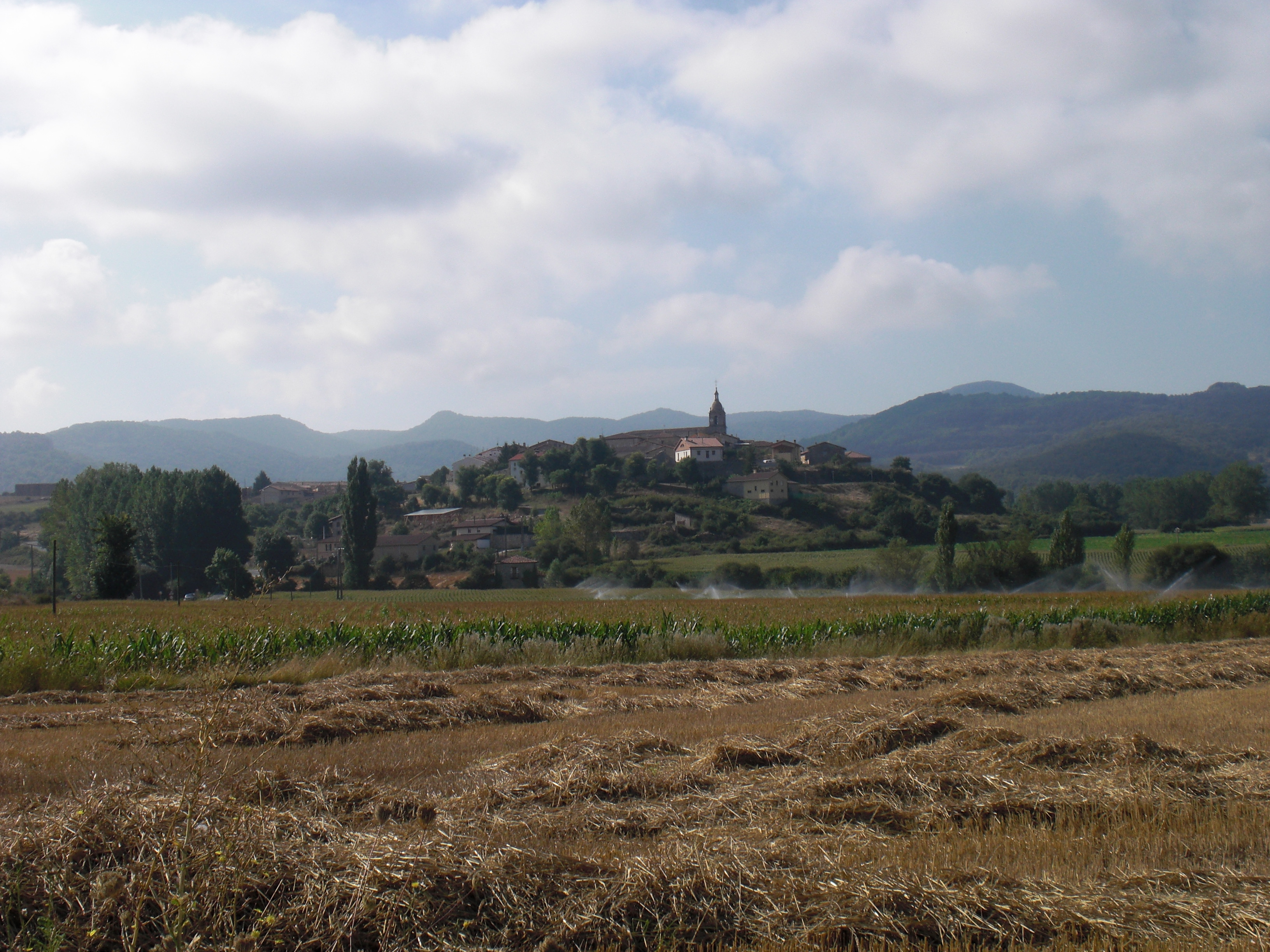 Urizaharrako ikuspegia